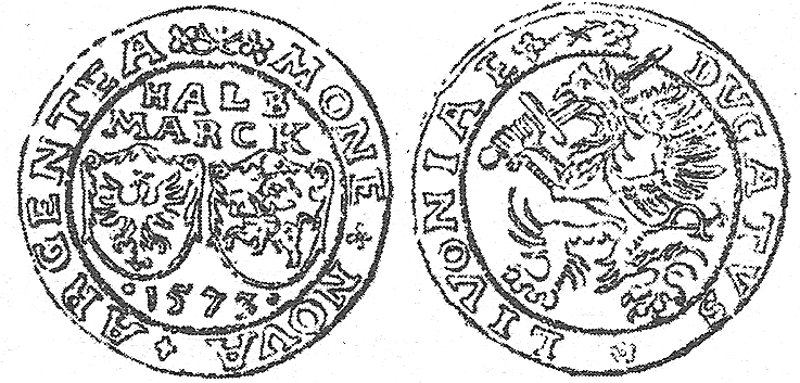 Półmarkówka_kurlandzka_1573r.jpg